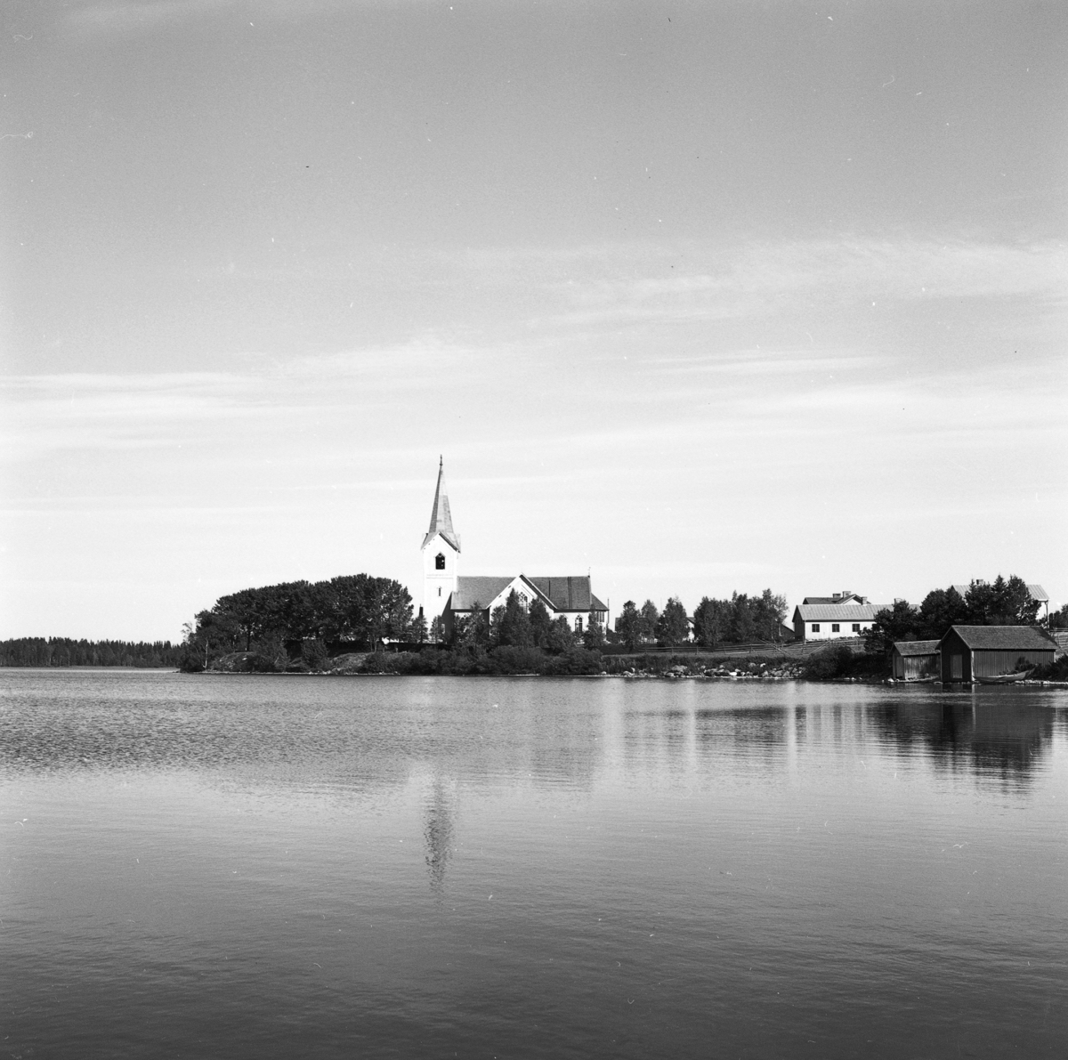 Gåxsjö kyrka och Gåxsjön. Foto taget före den stora restaureringen 1961 då takspånet utbyttes mot korrugerad plåt.